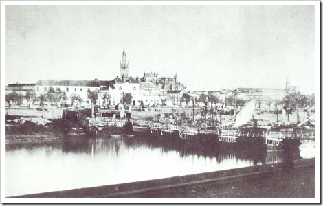 Vista del puente de barcas de Sevilla en 1851, en el emplazamiento provisional en el que se situó desde el inicio de las obras del Puente de Triana en 1851 en el emplazamiendo que había tenido antes el puente de la imagen, y el desmontaje del mismo en 1852, tras la finalización de las obras de su substituto